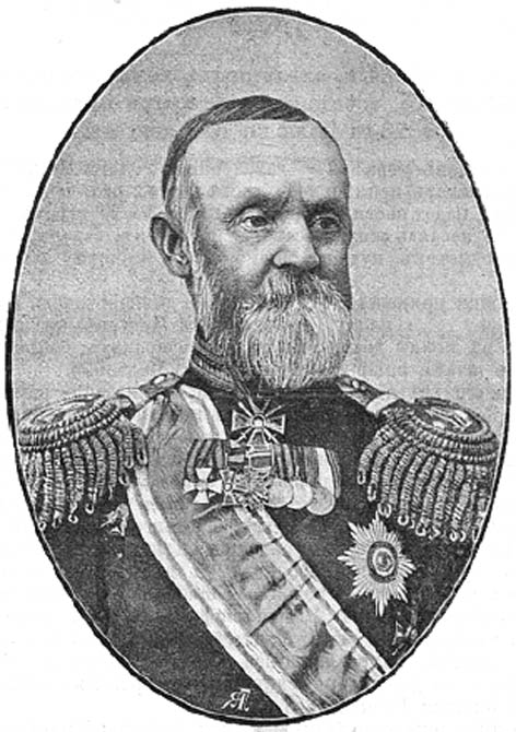 Александр Эммануилович Будде (1833—1915) — генерал от артиллерии, герой русско-турецкой войны 1877—1878 годов.